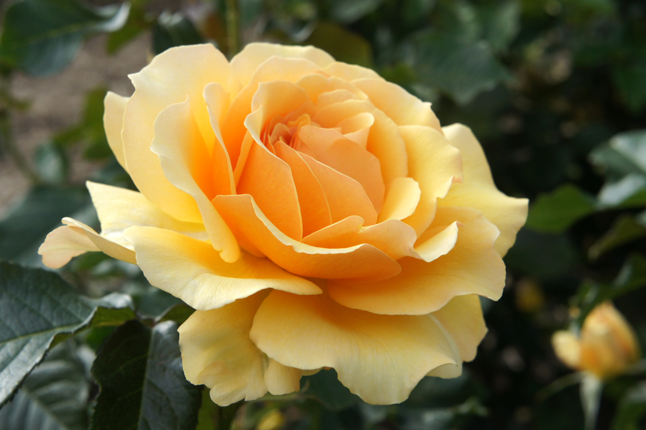 Rose Amber Queen バラ アンバー クイーン Floribunda rose フロリバンダ United Kingdom イギリス Harkness 1983